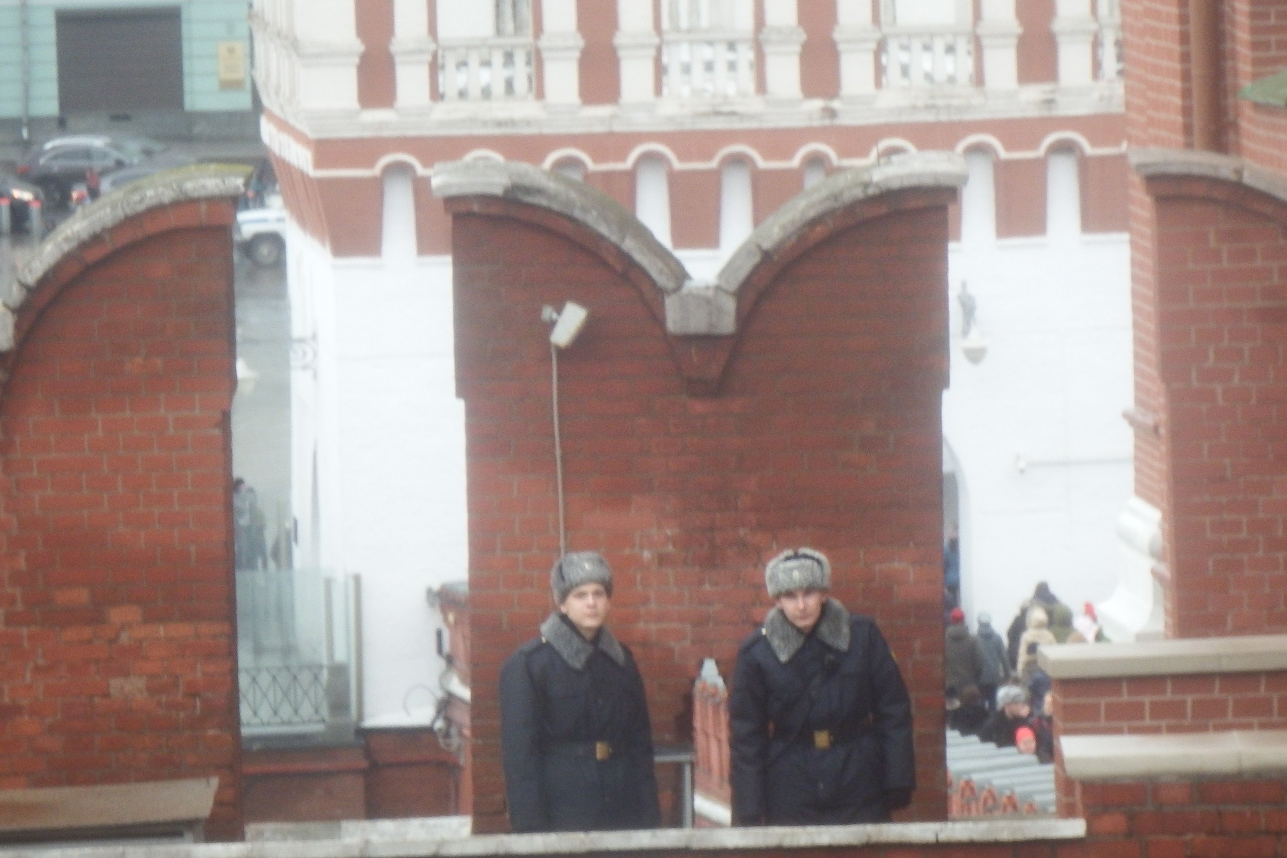 Солдаты Федеральной службы охраны на стене Московского Кремля